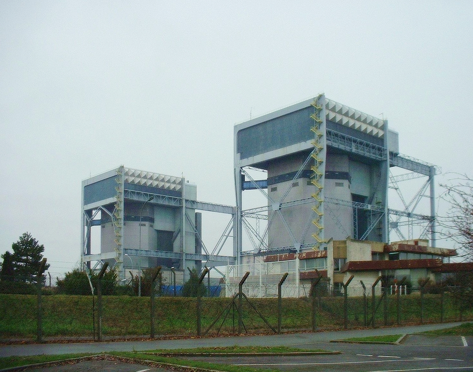 Tranche A1 et A2 de la centrale nucléaire de Saint Laurent des Eaux